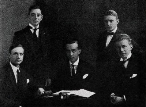 Styret ved Studentersamfundet i Trondhjem vårsemesteret 1919. Stående: Finn Knudsen og Chr. Fr. Mathiesen. Sittende: Ingemann Torp, Jac. Chr. Kielland (formann) og Arne Solem (viseformann).